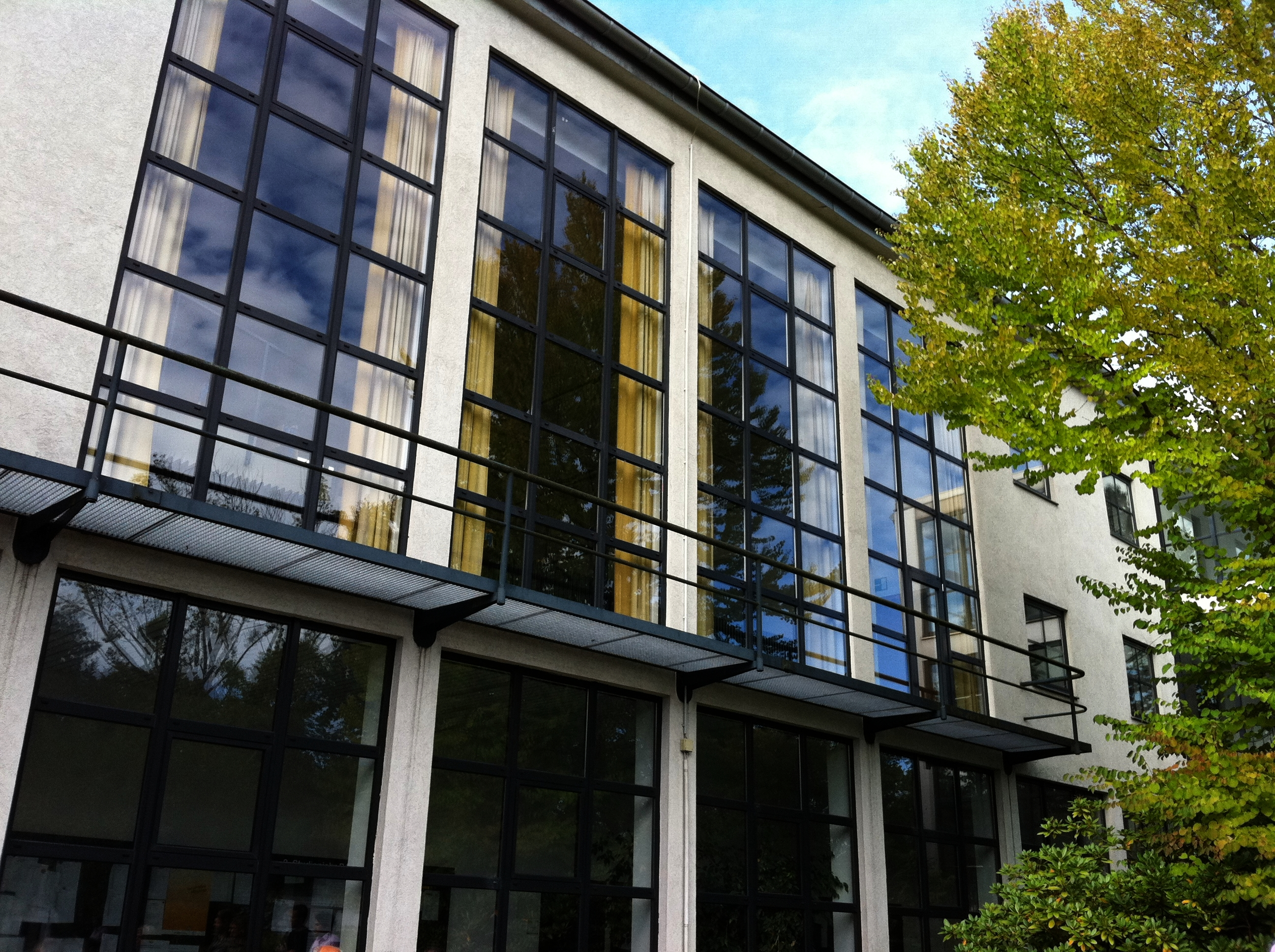 Soziale Frauenschule Aachen, 1929/30 erbaut: Architekt: Rudolf Schwarz